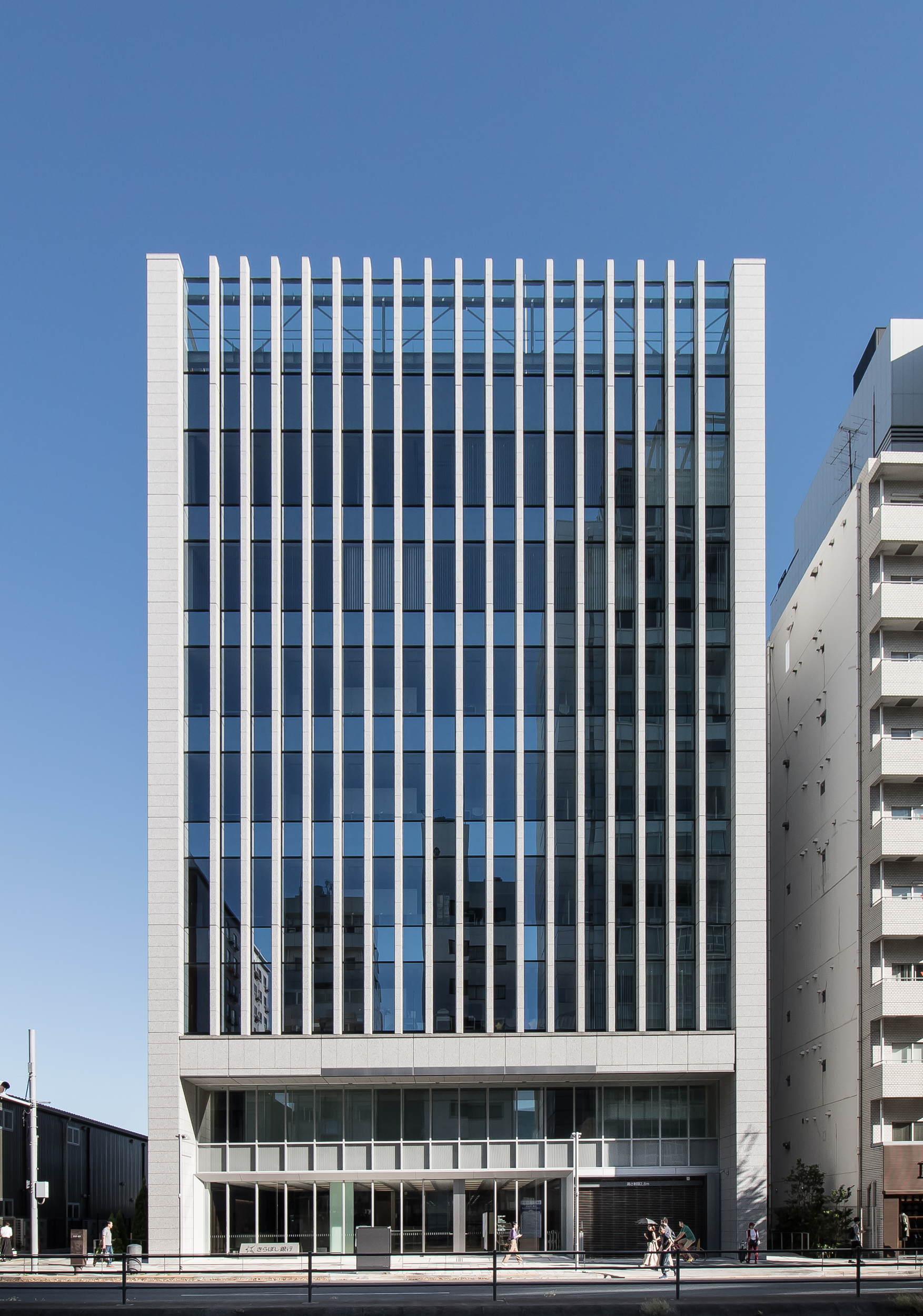 きらぼし銀行本店